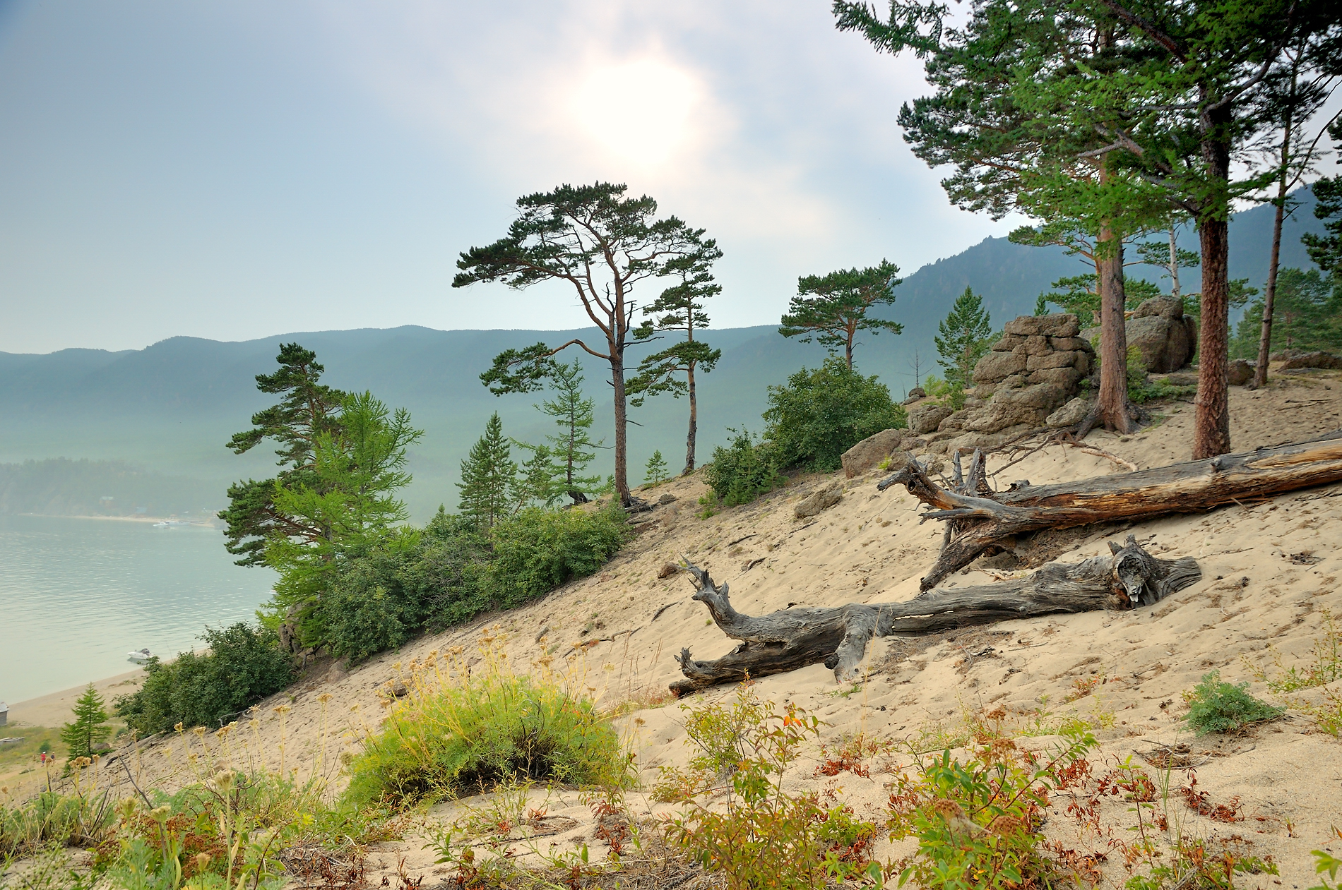 Песчаная бухта, Иркутский район. This image is related to the protected area of Russia number 3810088